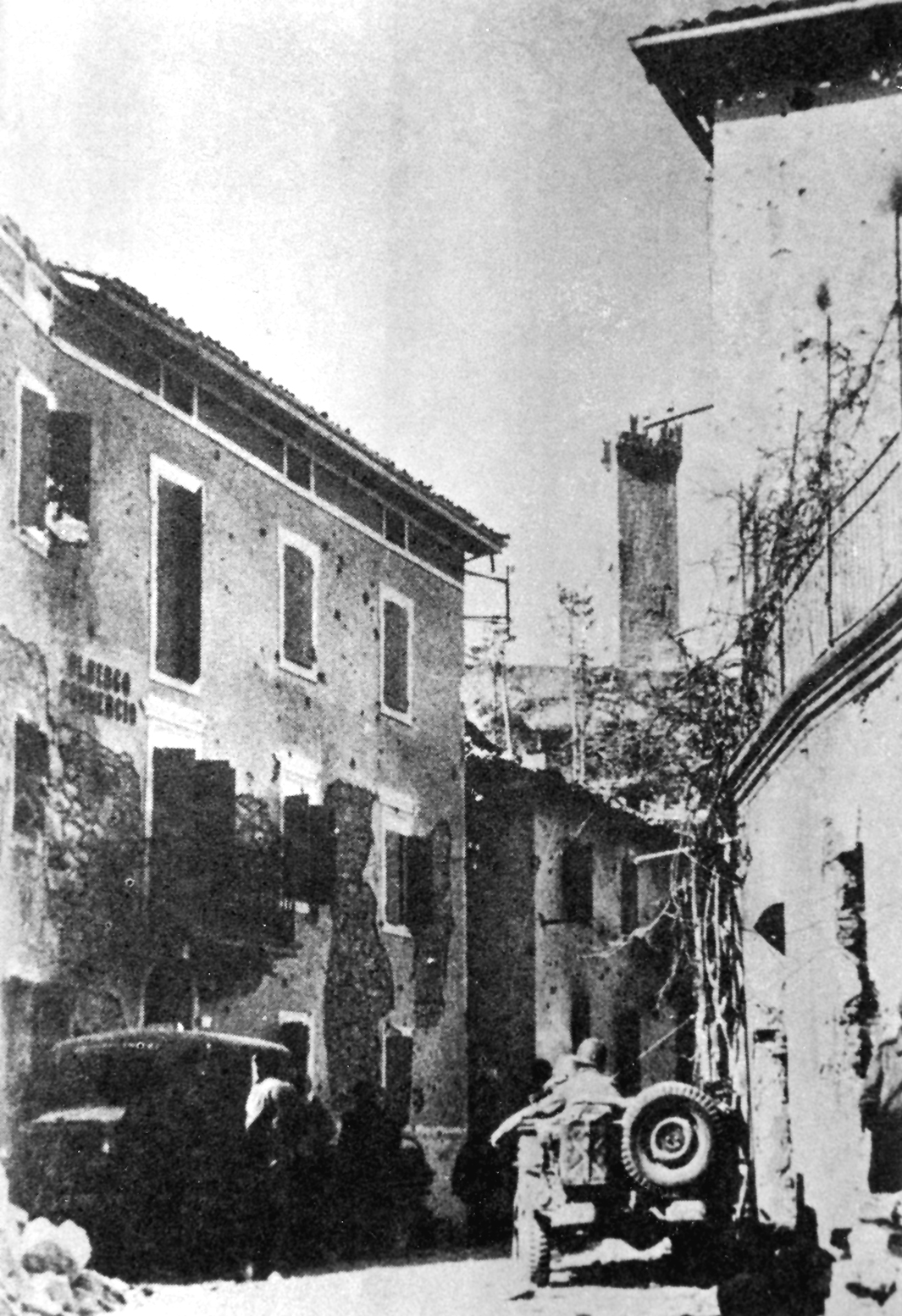 Mezzi della Força Expedicionaria Brasileira (FEB) in via Righi a Montese